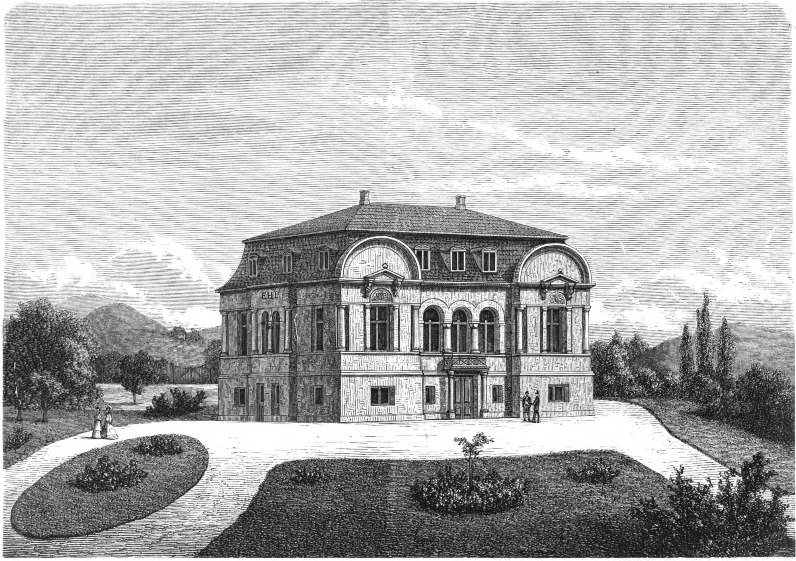 Avlsgaarden Margrethesminde ved Vester Aaby i Fyen, fra Nordiske Billeder, fjerde bind, København 1870.